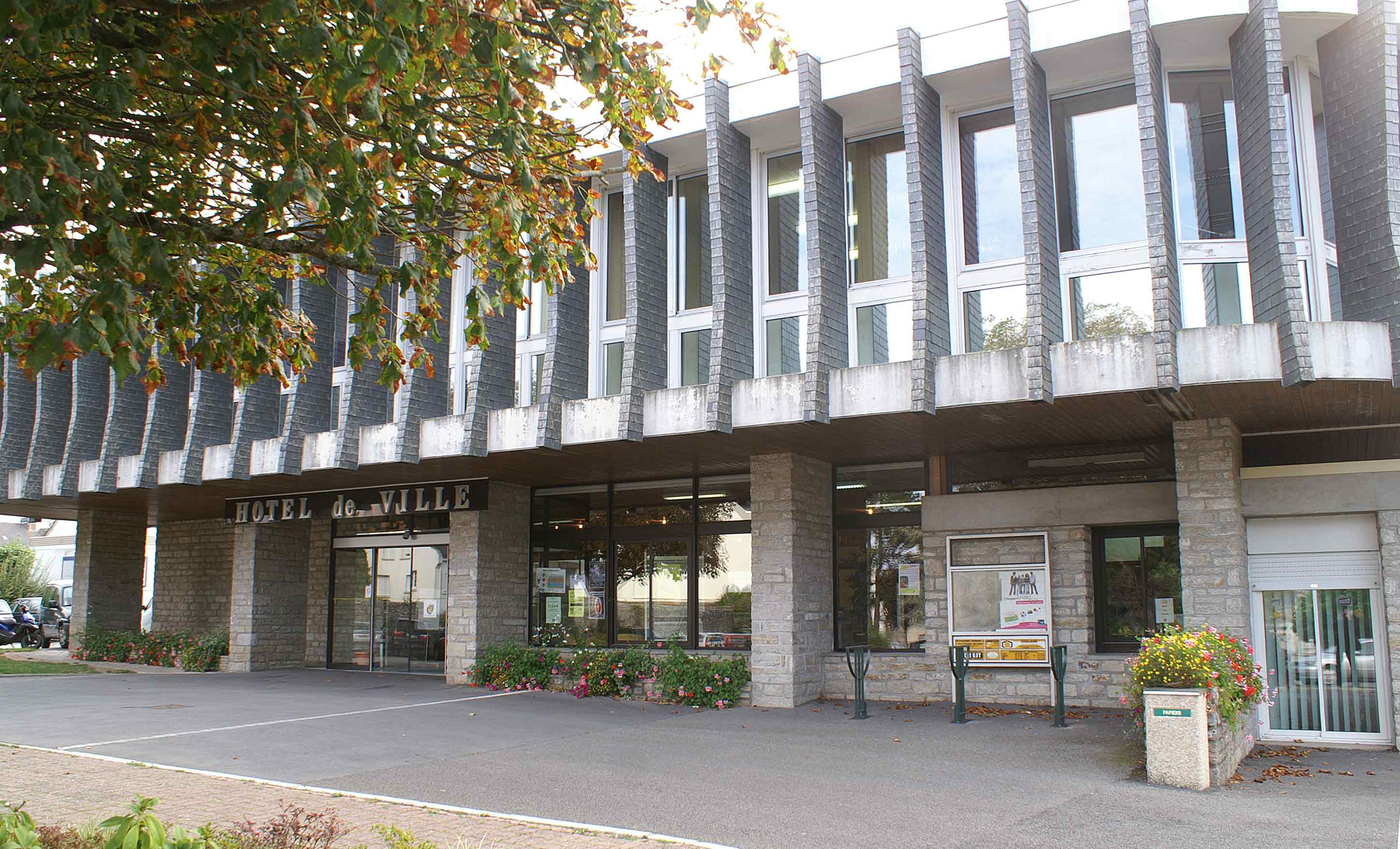 L'Hôtel de Ville de Questembert dans le Morbihan.